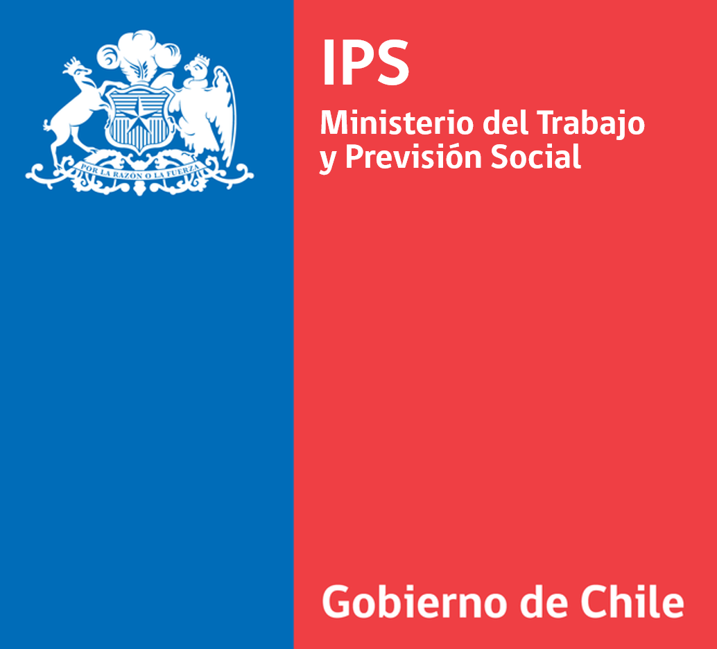 Logo del Instituto de Previsión Social del Ministerio del Trabajo y Previsión Social.